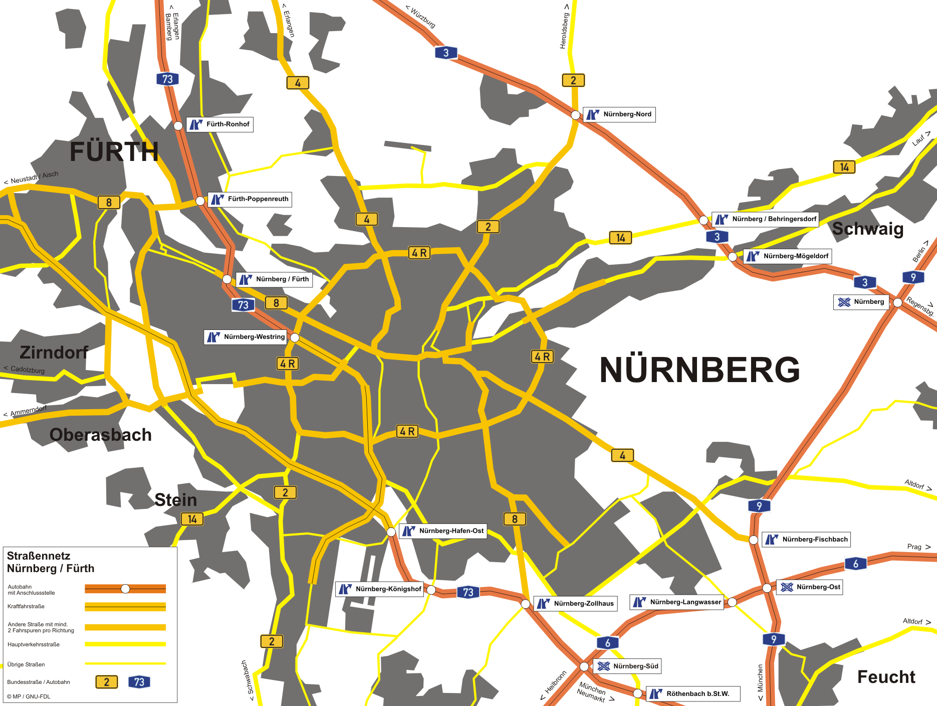 Übersicht über das Hauptstraßennetz in Nürnberg und Fürth